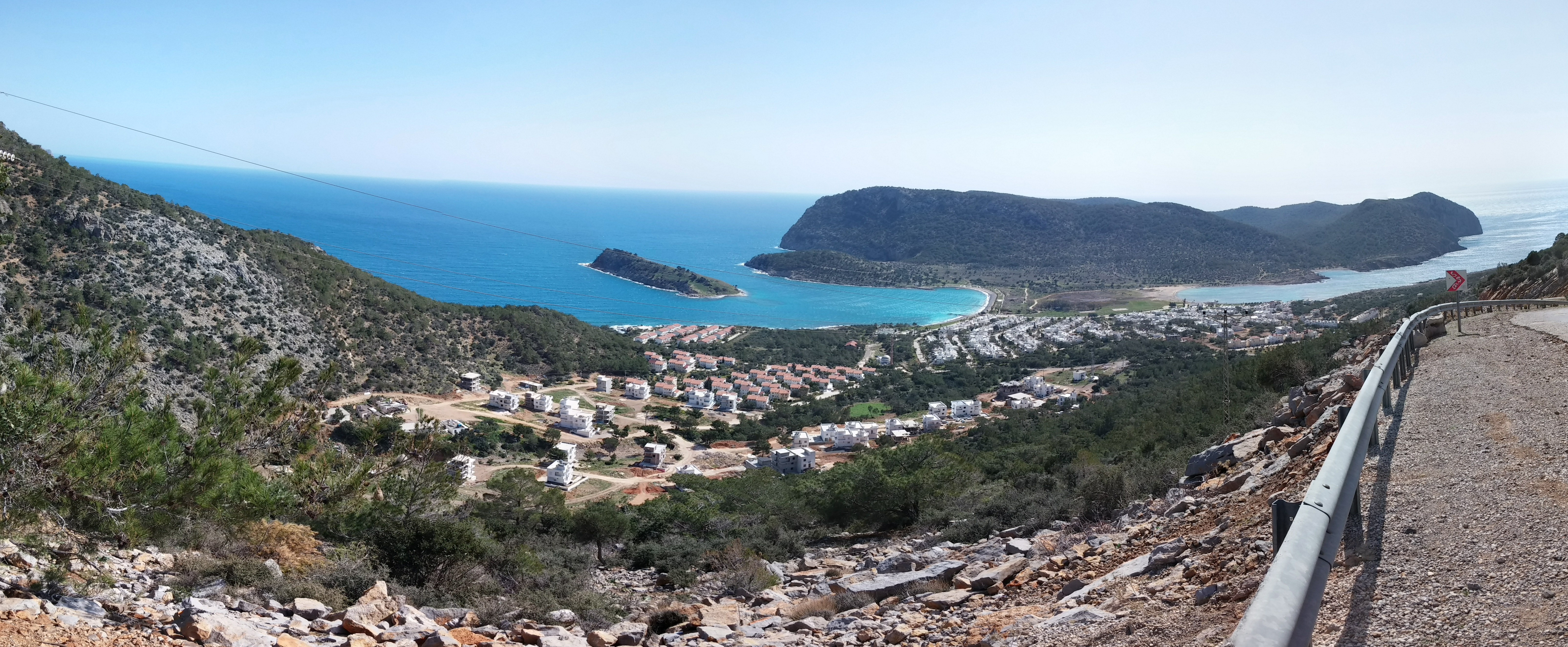 Tisan Koyu'nun panoramik görünümü.